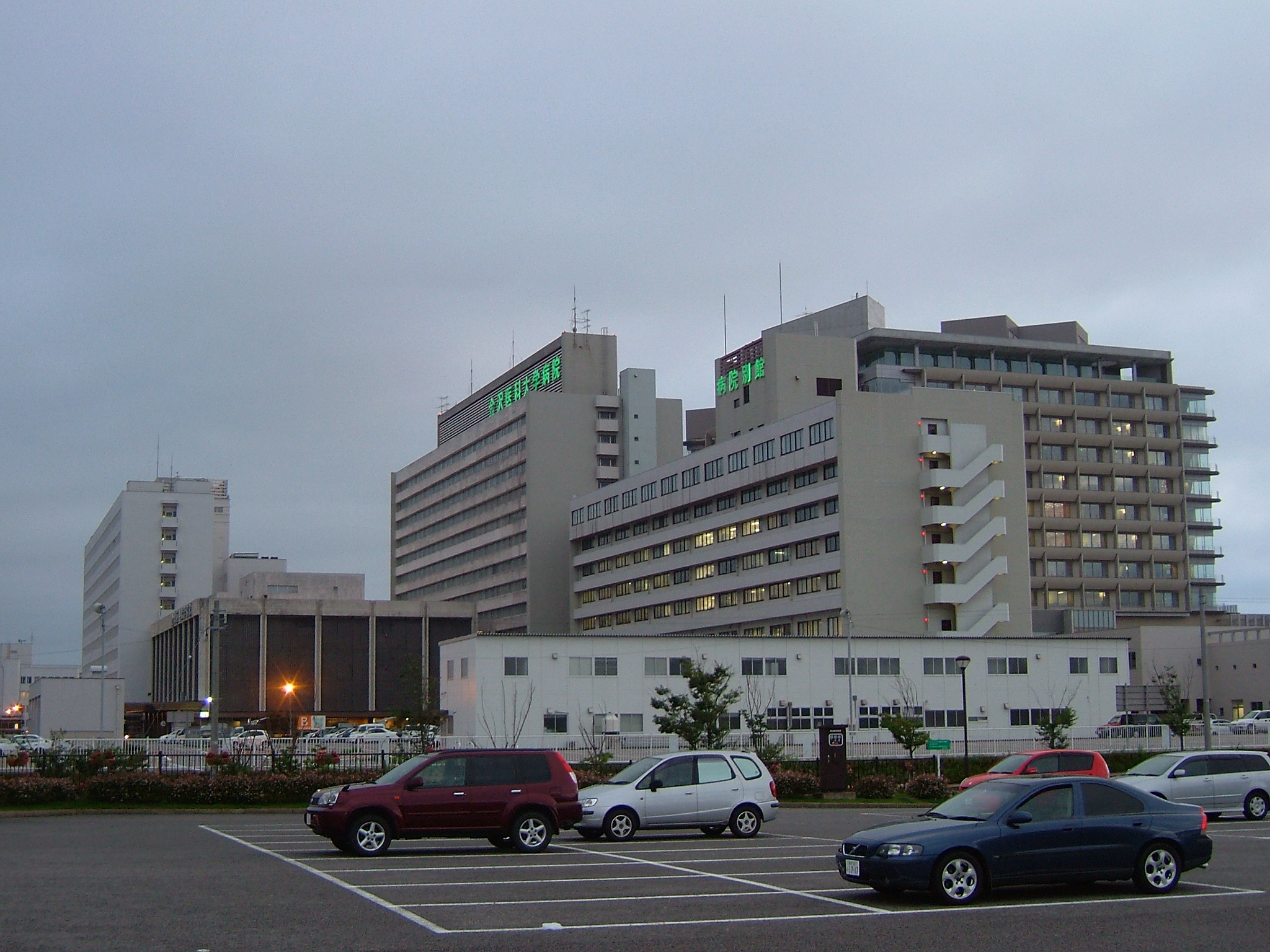 金沢医科大学病院（石川県河北郡内灘町）